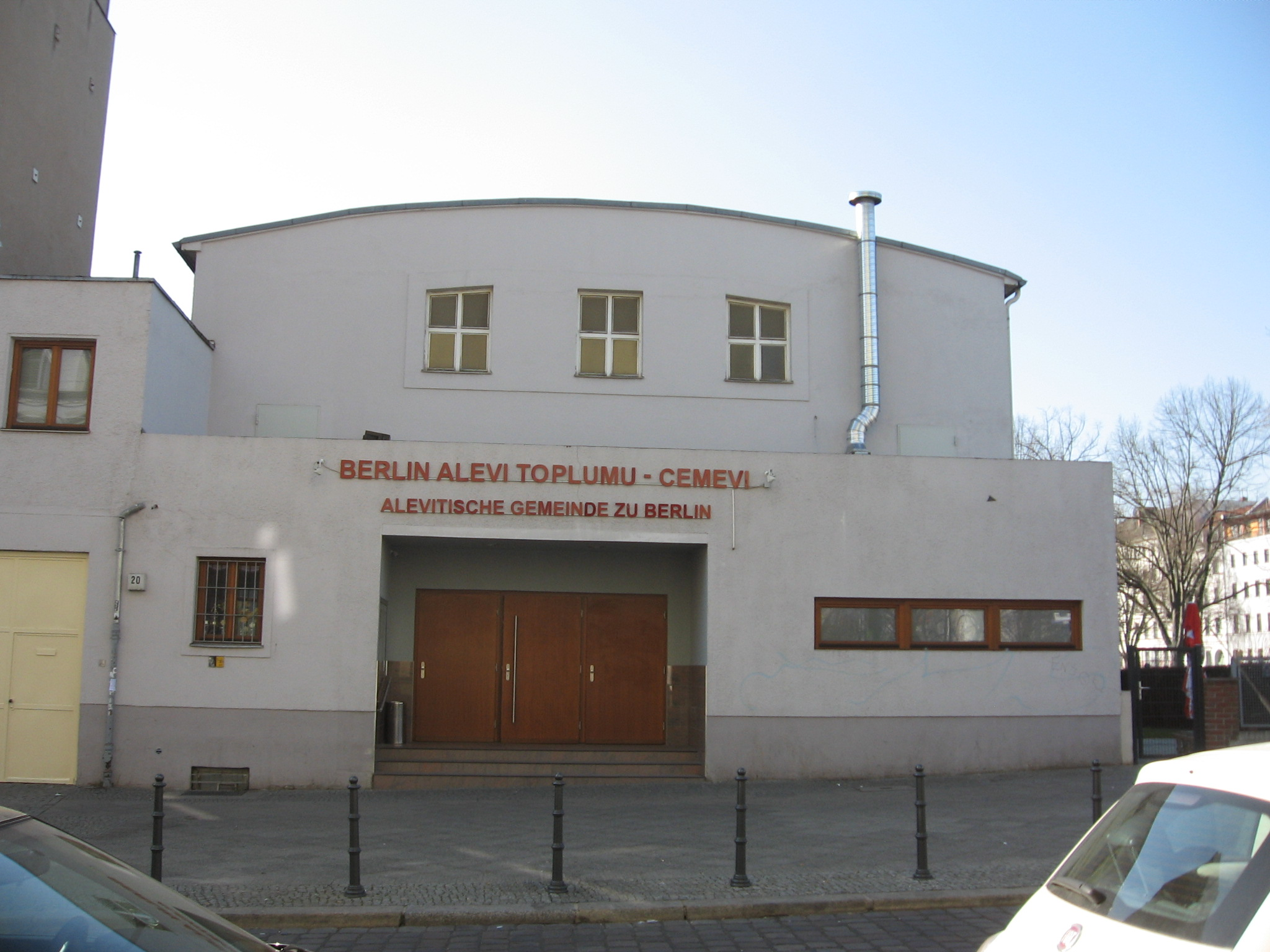 AAKM-Cemevi in der Waldemarstraße in Kreuzberg. Ist ein alevitisches Gebetshaus und Gemeindezentrum. Es wird vom Verein „Almanya Alevi Birlikleri Federasyonn“ (Alevitische Gemeinde Deutschlands) betrieben.